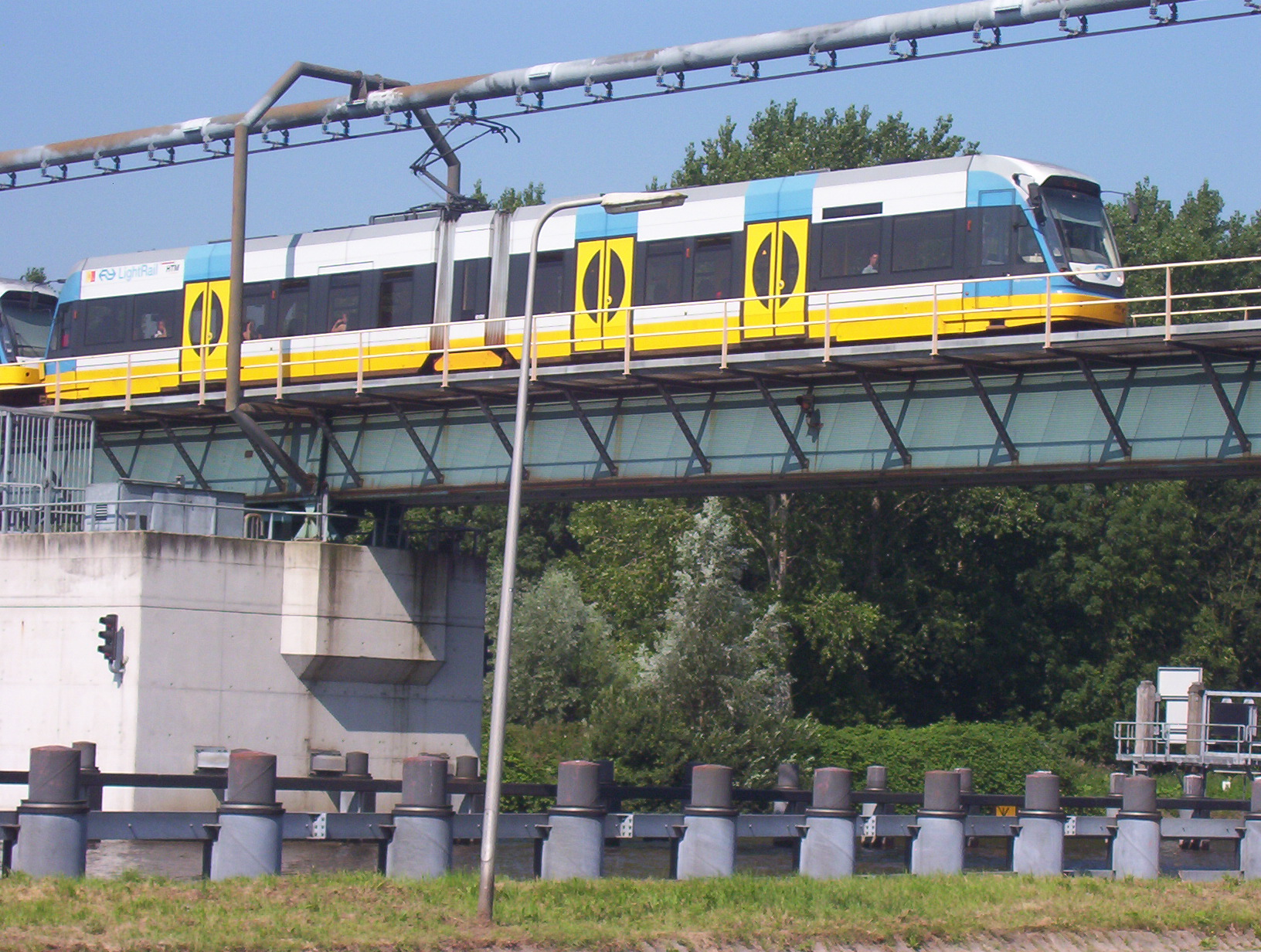 Lage Gouwe spoorbrug